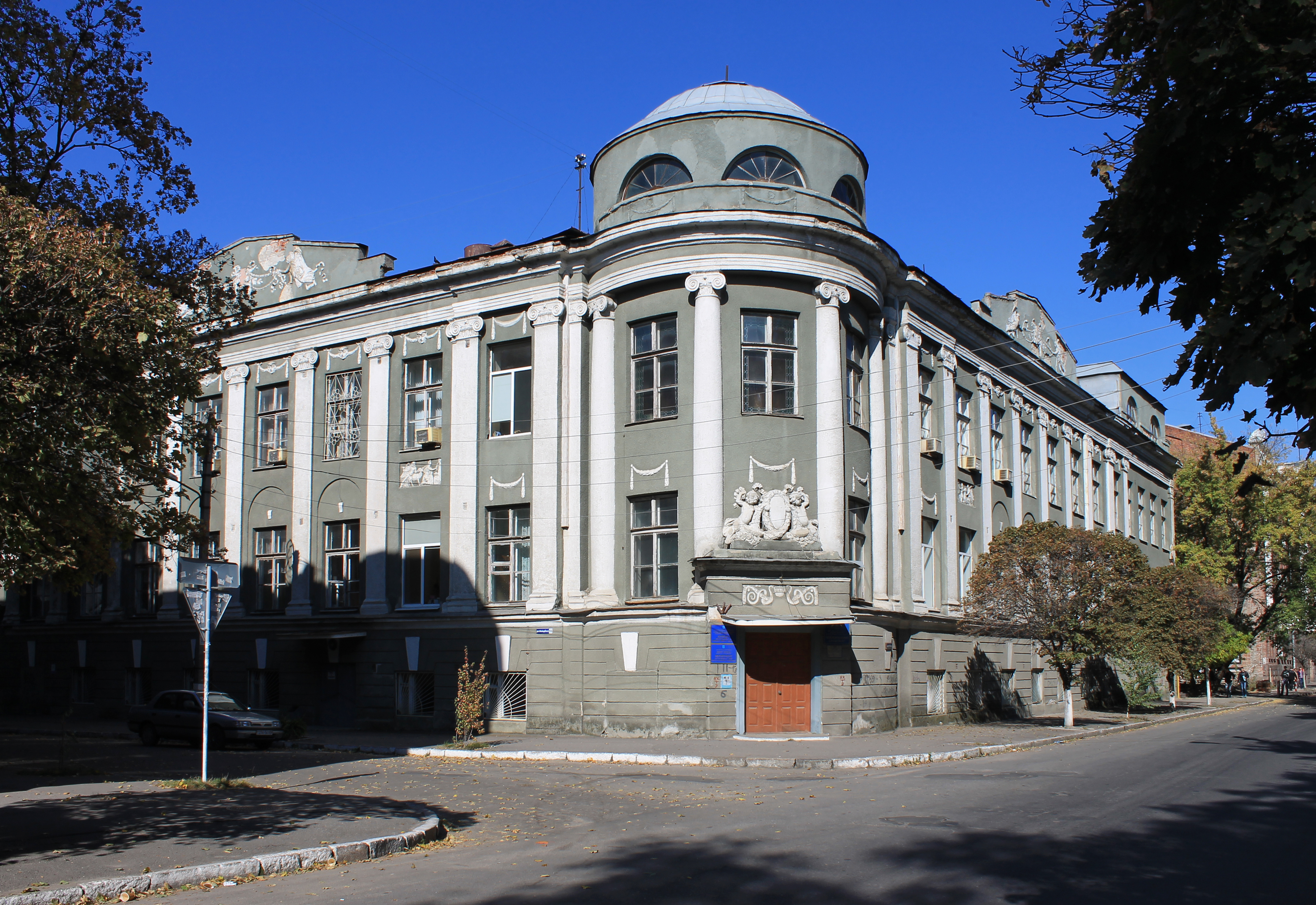 Колишня будівля Лікарні Червоного Хреста 1914 р., пл. Фейєрбаха,5, м.Харків.